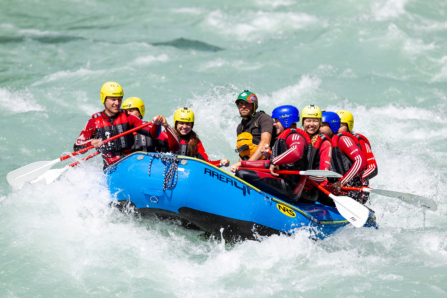 Rafting auf dem Wildfluss Inn